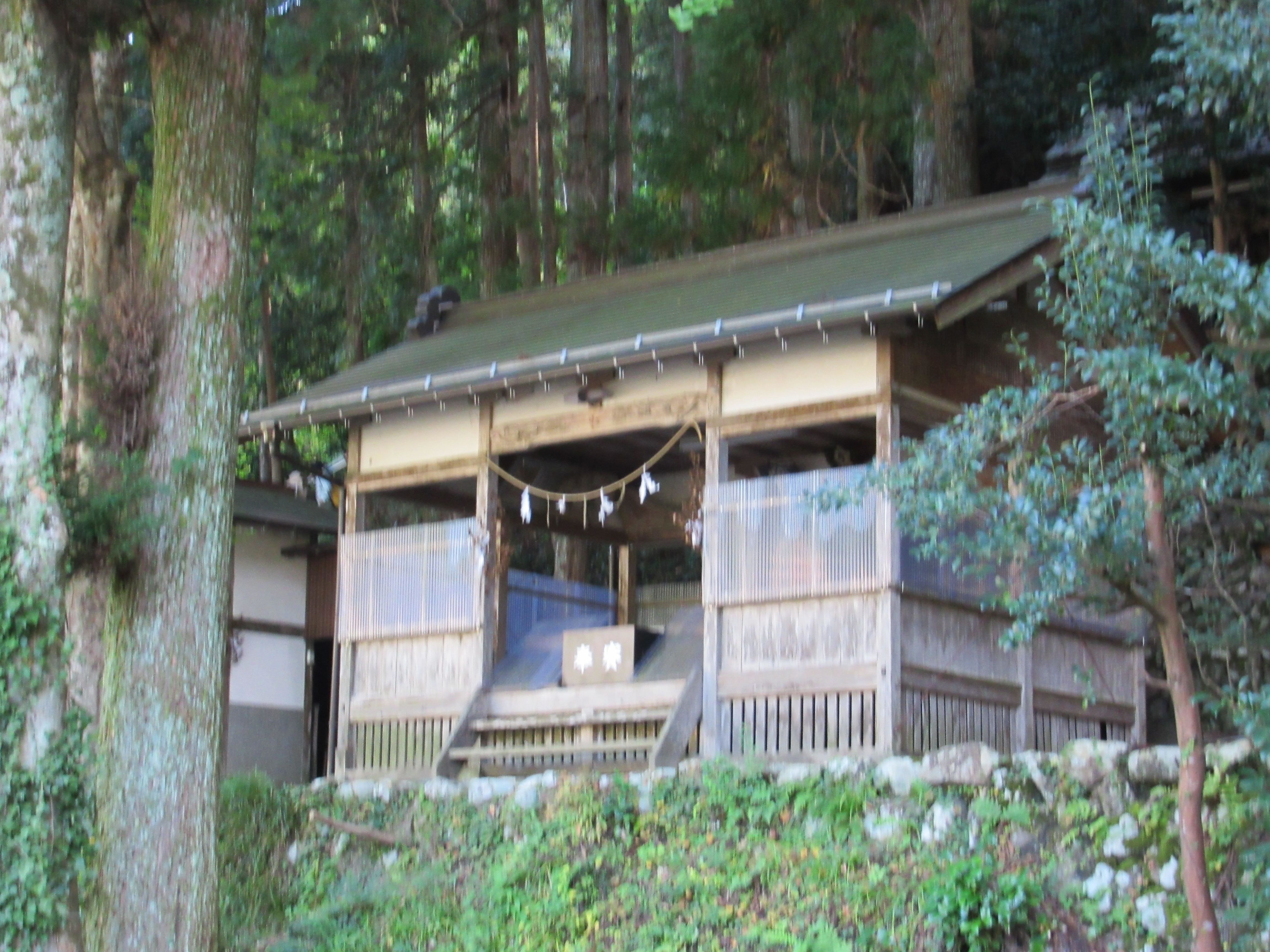 八坂神社本殿